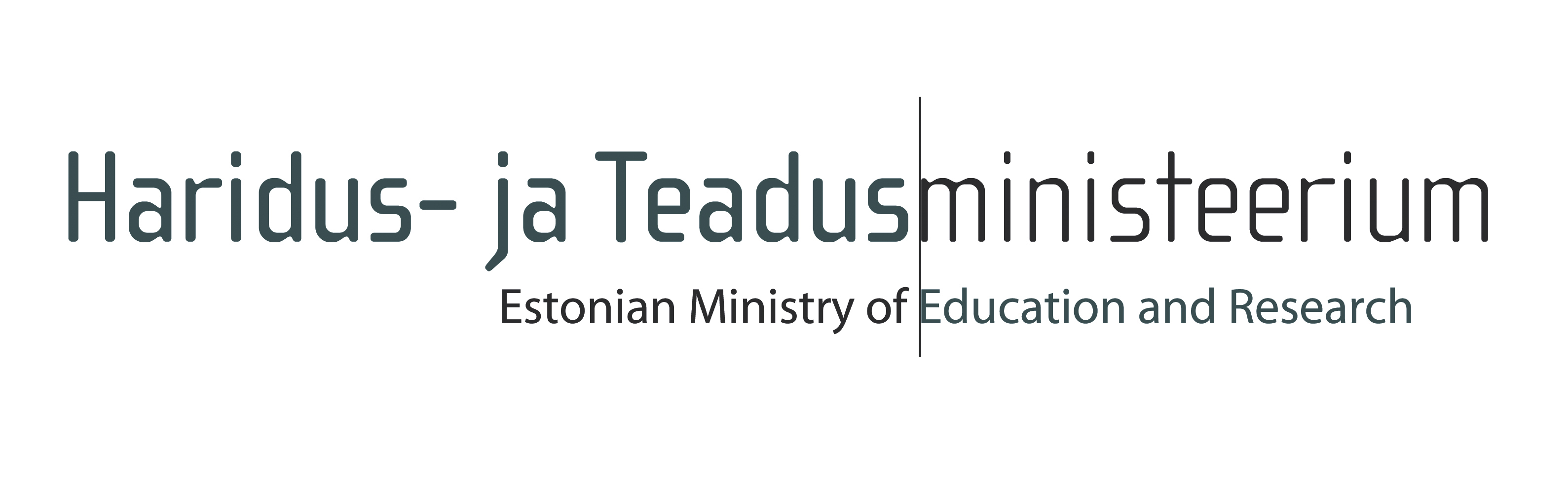 Haridus- ja Teadusministeeriumi logo